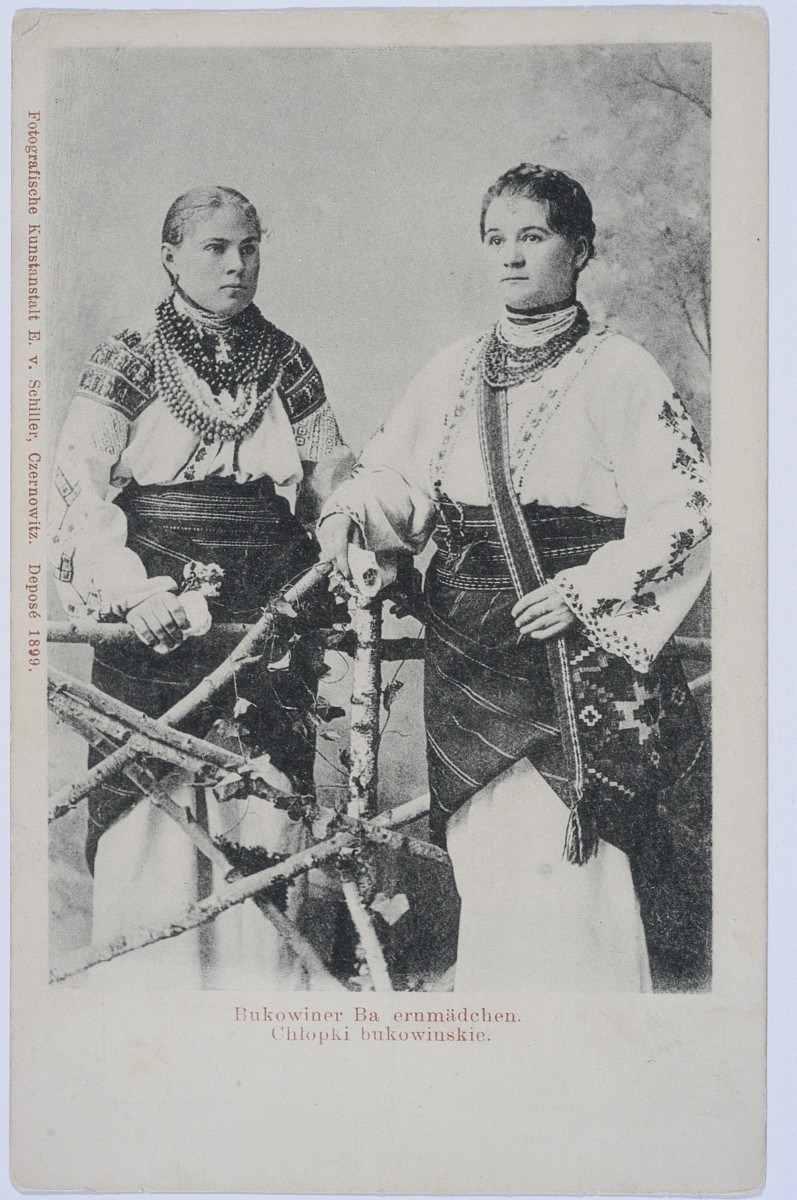 Буковинки